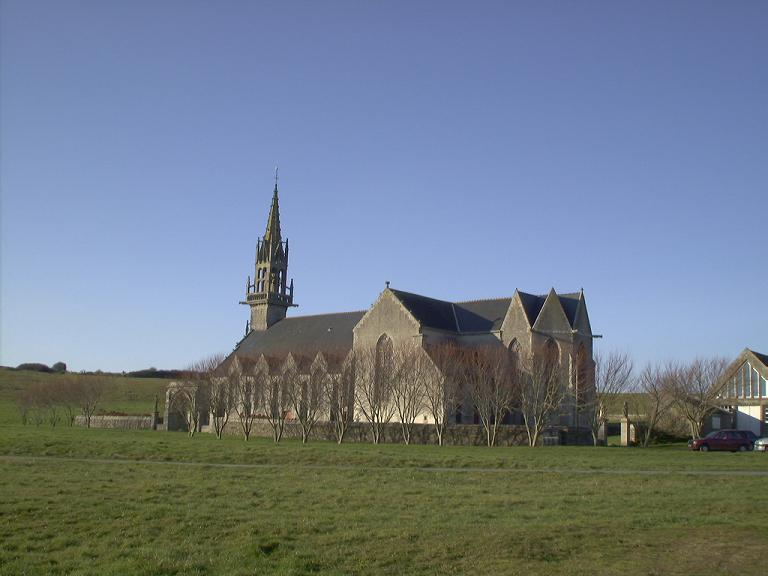 Chapelle de Sainte-Anne La Palud à Plonévez-Porzay